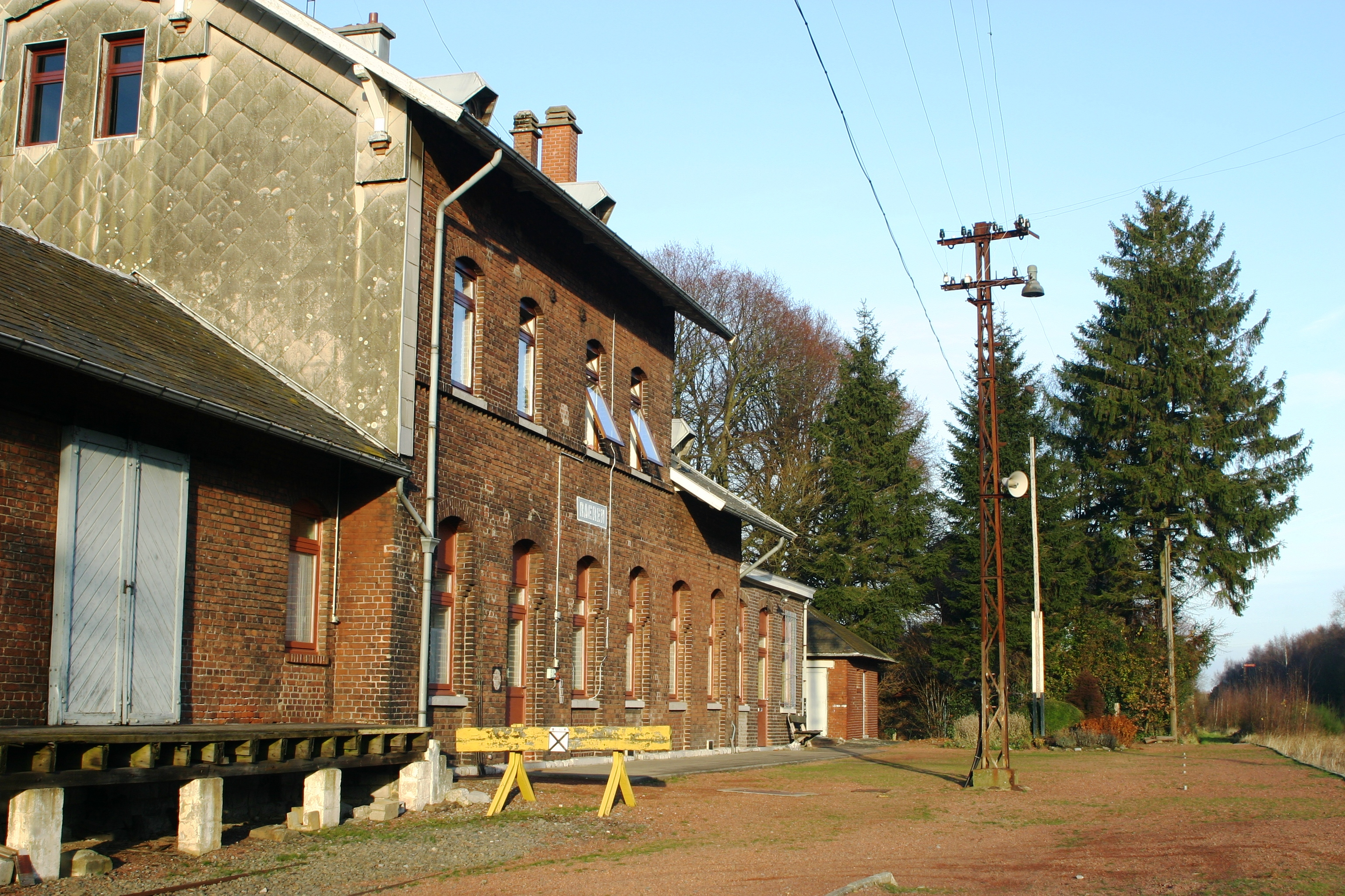 Gare Raeren